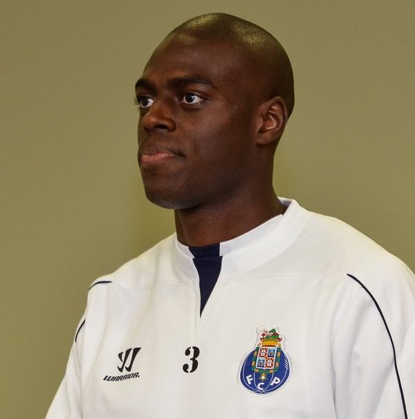 Бруо Мартінс Інді під час виступів за Порту